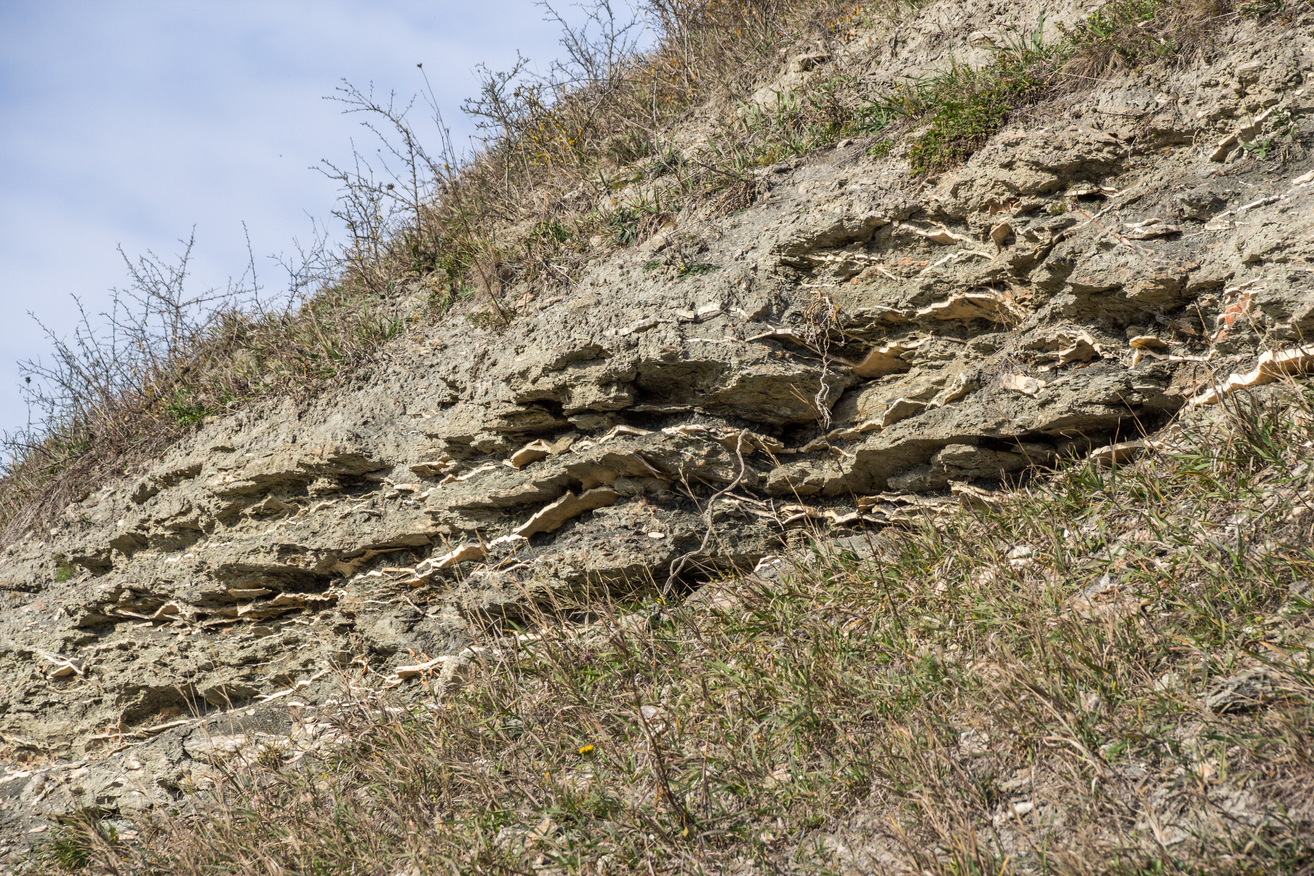 Aufschlüsse, Geotop, Iphofen, Tonmergelstein am Schwanberg